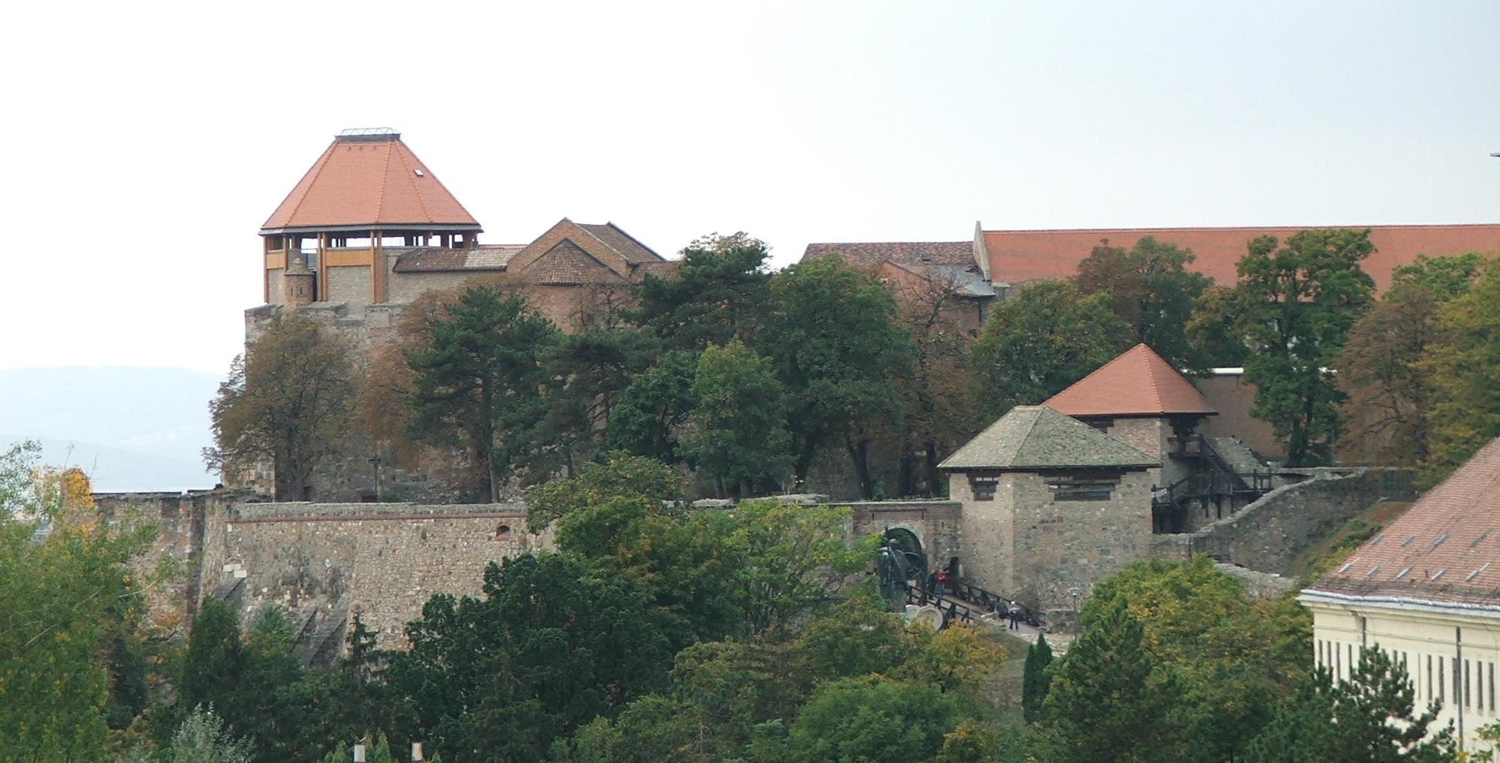 Az esztergomi vár